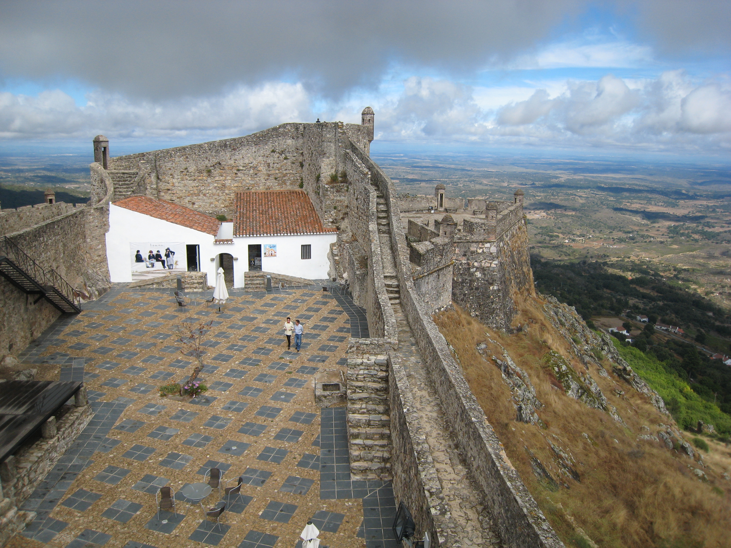 Castelo de Marvão, Marvão, Portugal.